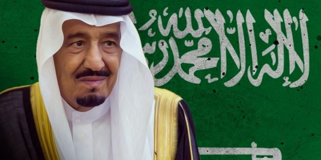 সৌদি বাদশাহ